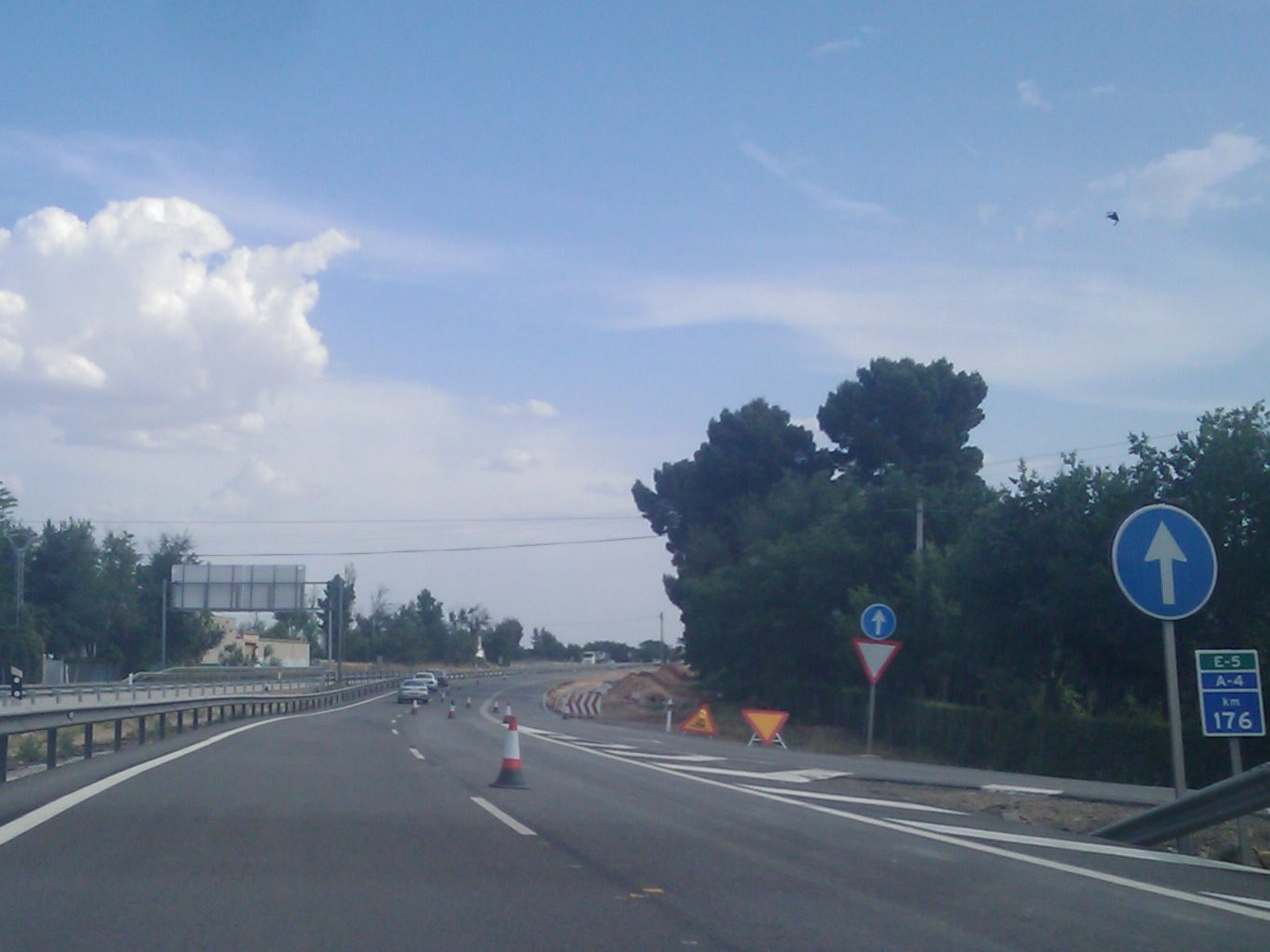 A-4 near Manzanares